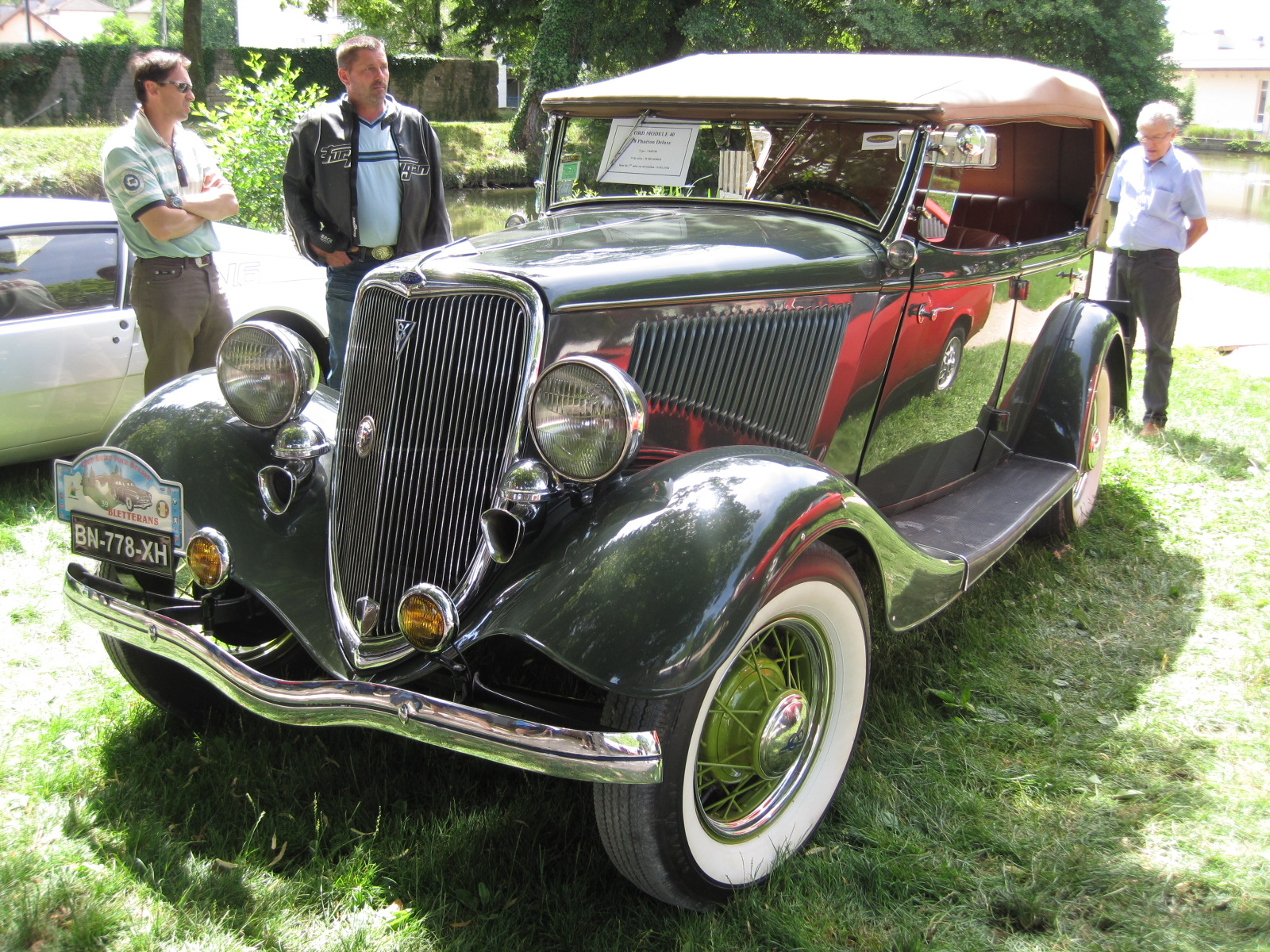 Ford Model 40